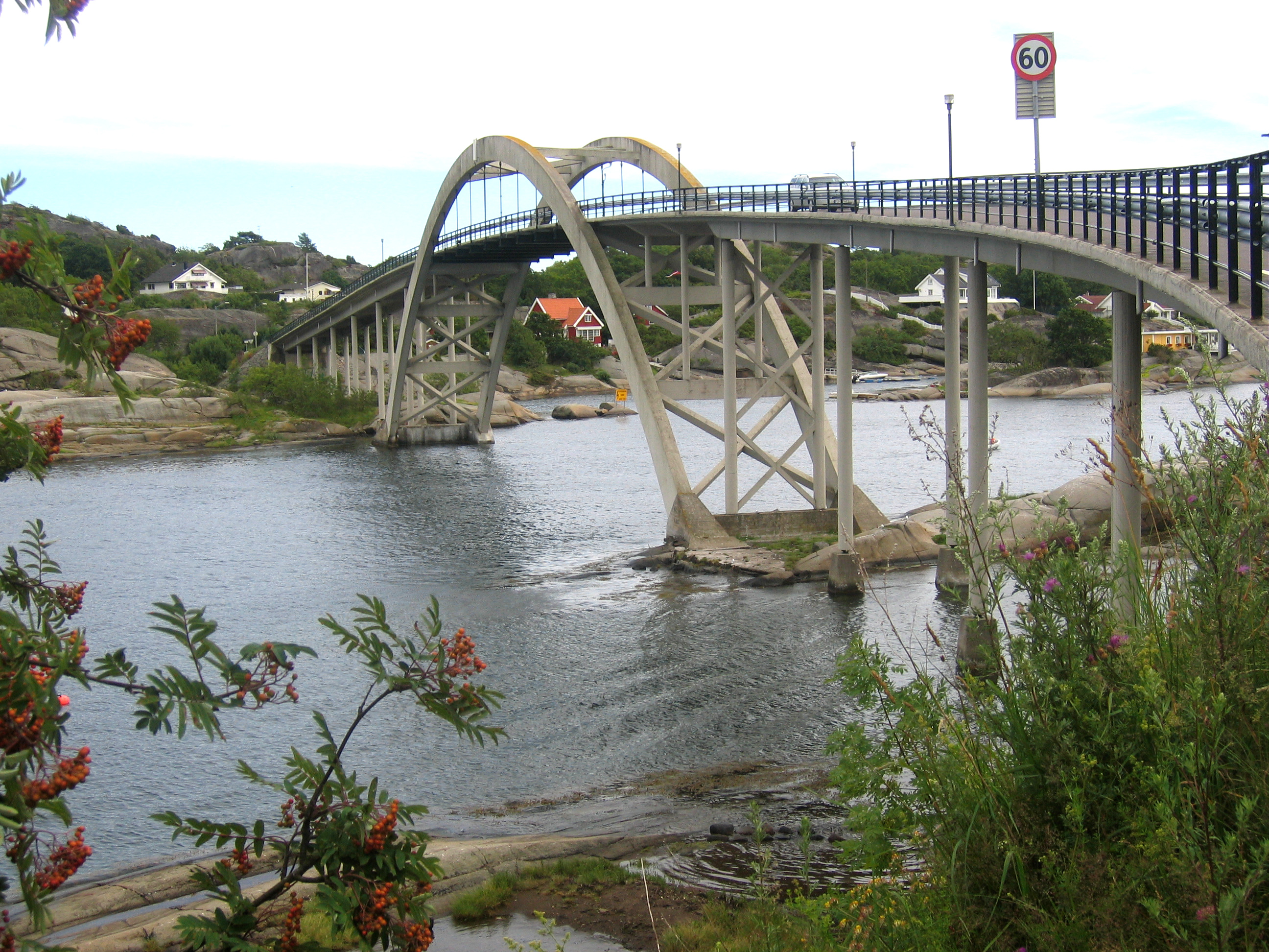 Røssesundbrua, mellom Tjøme og Brøtsø i Tjøme kommune.